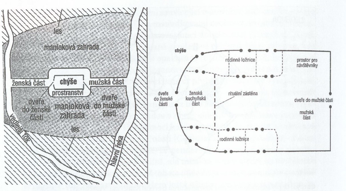 Symbolický rozměr uspořádání domu a jeho okolí u kmene Barasanů (Kolumbie) Na dispozici obydlí je patrné, jak každodenní činnosti a architektura dokážou sjednotit sociální struktury, náboženství a kosmogonické představy a zároveň reflektovat genderové vztahy